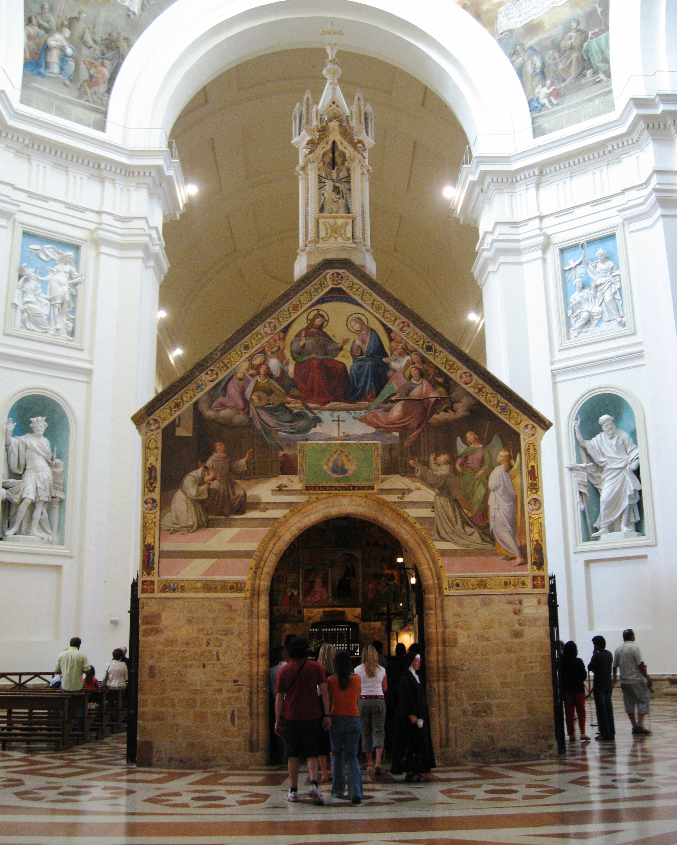 Santa Maria degli Angeli in Assisi - Porziuncola